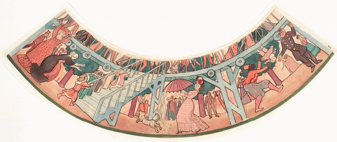 Maurice Denis (1870-1943) Le Trottoir roulant, vers 1900 Aquarelle et/ou gouache sur traits de crayon sur papier collé sur un support secondaire - 17,5 x 76,5 cm Paris, Musée d’Orsay Photo : Paris, Musée d’Orsay